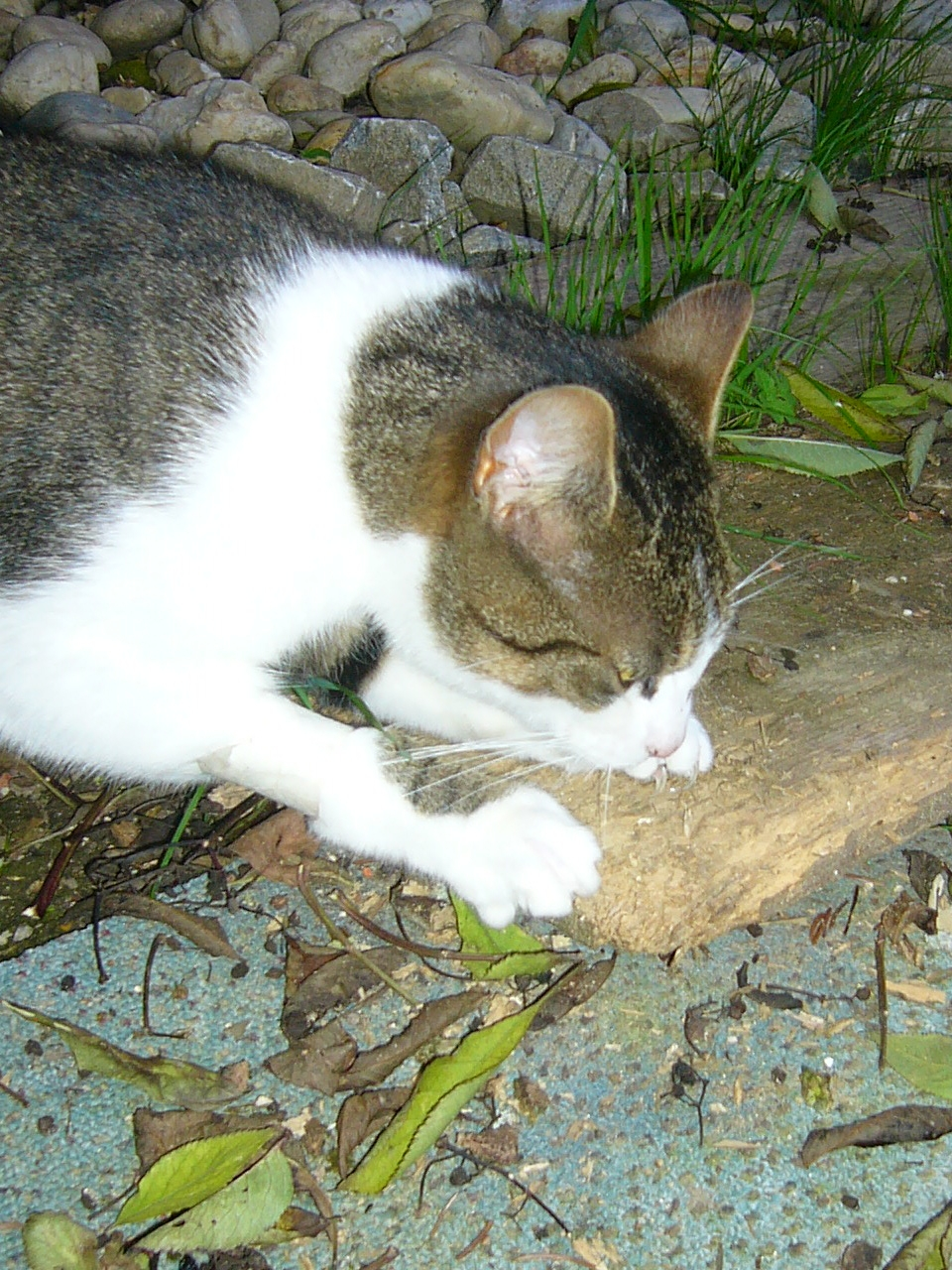 Krallenpflege einer Hauskatze